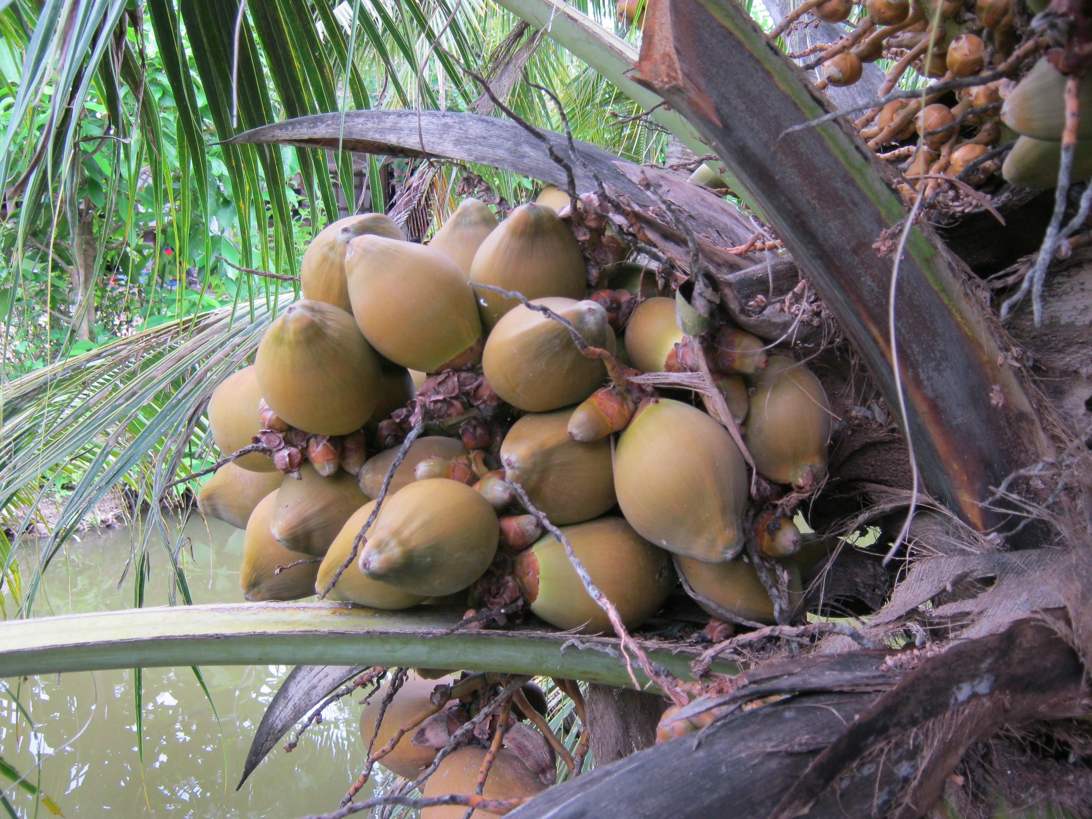 Dừa xiêm lửa tại Rạch Giá (Kiên Giang, Việt Nam)